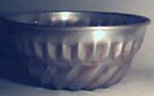 Flanera